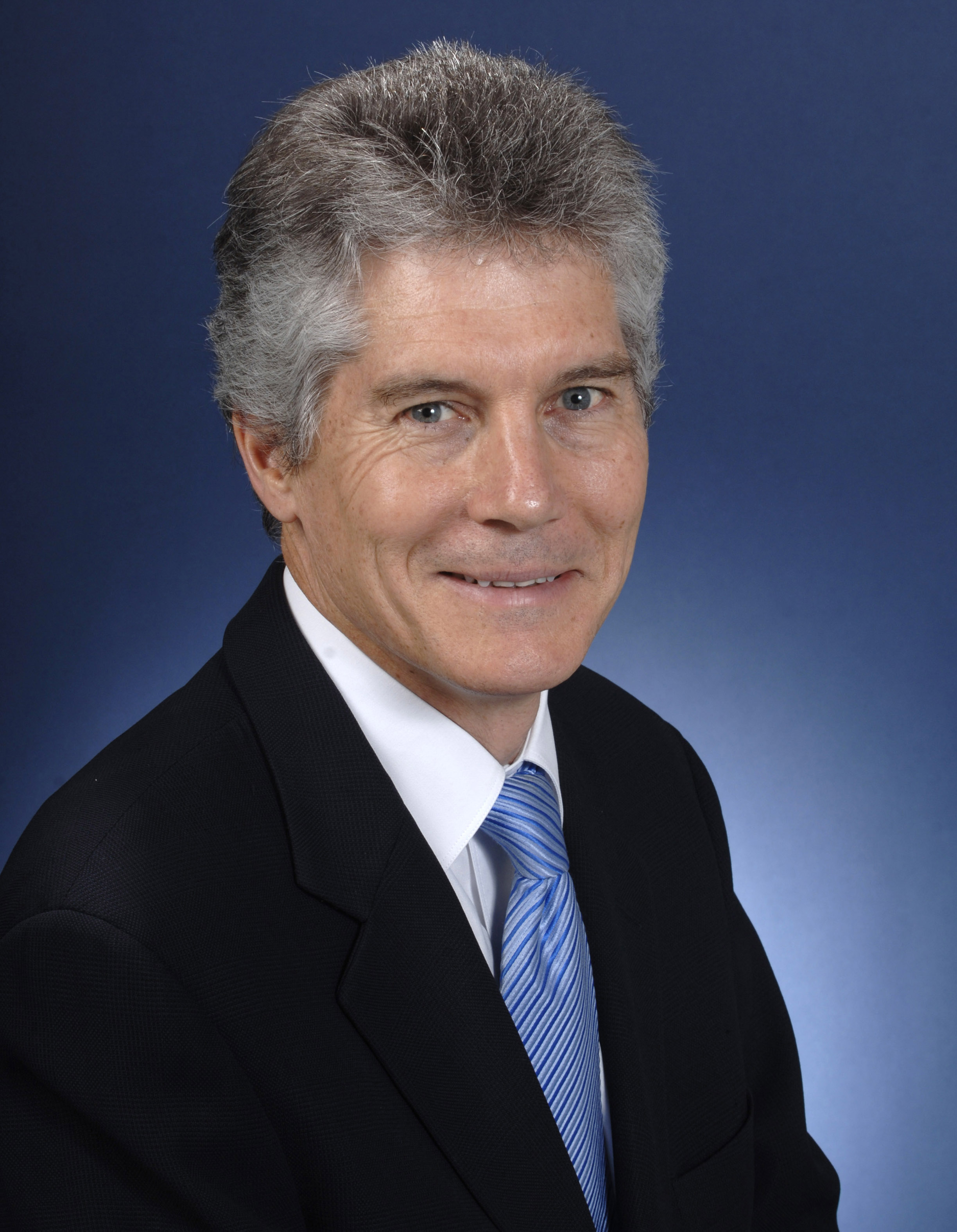 Stephen Smith